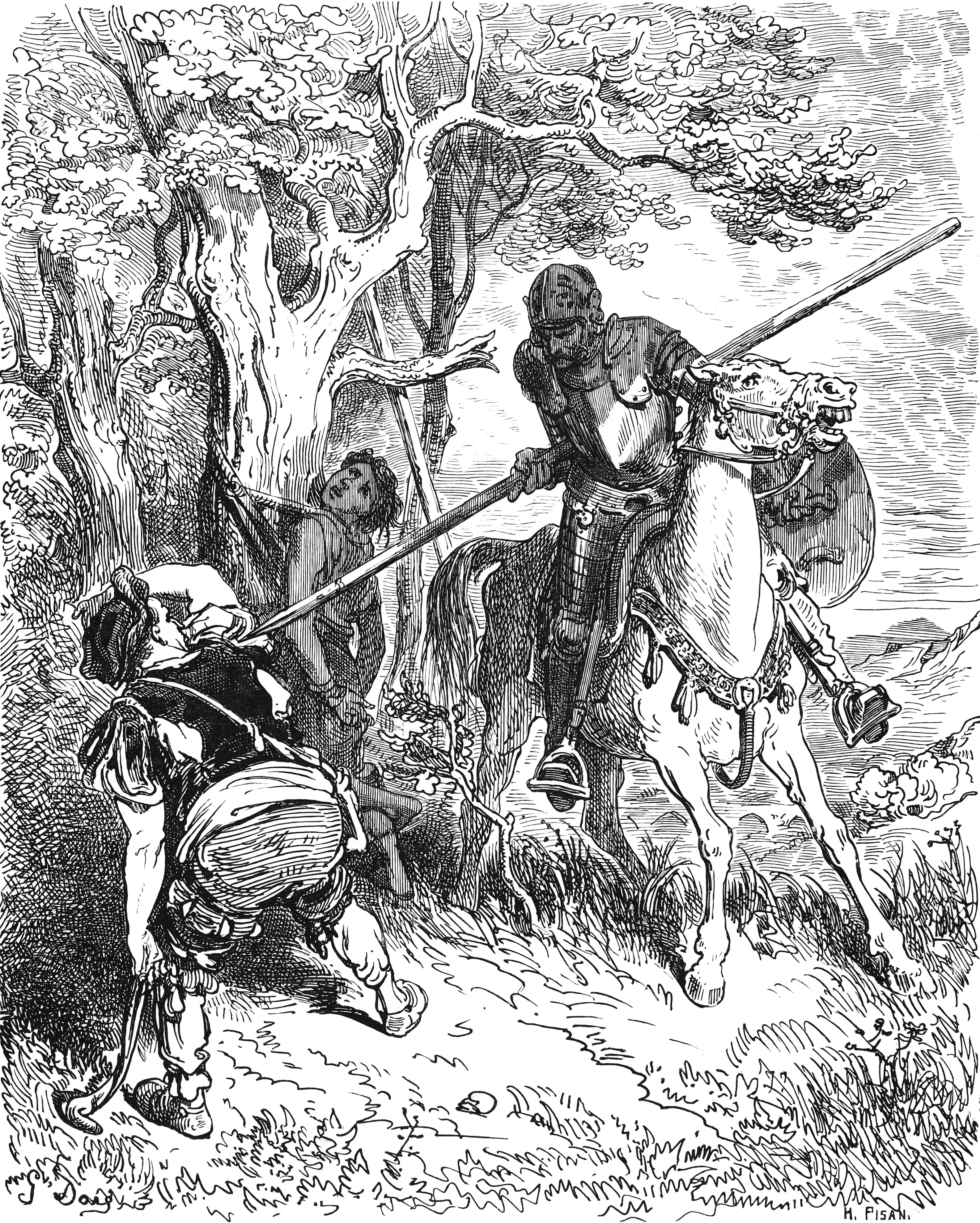 "Dom Quixote investe contra o ruim vilão" iIustração por Gustave Doré para “Don Quixote“ de Miguel de Cervantes.